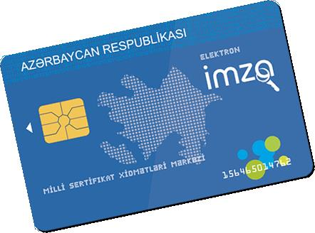 Azərbaycanda tətbiq olunan ilk rəqəmsal imza kartı